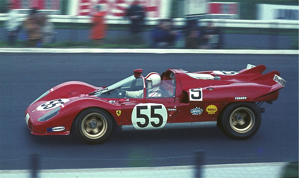 Nino Vaccarella im Ferrari 512 S s/n 1042, 31.05.1970 beim 1000-km-Rennen des ADAC auf dem Nürburgring.[1]